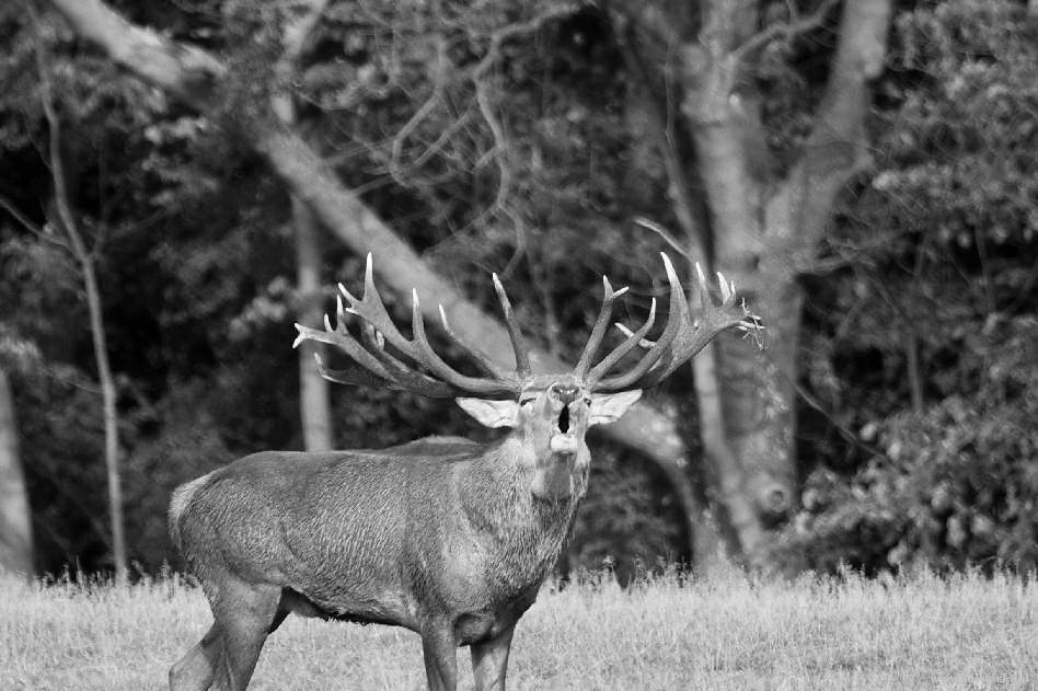 олень ищет соперника